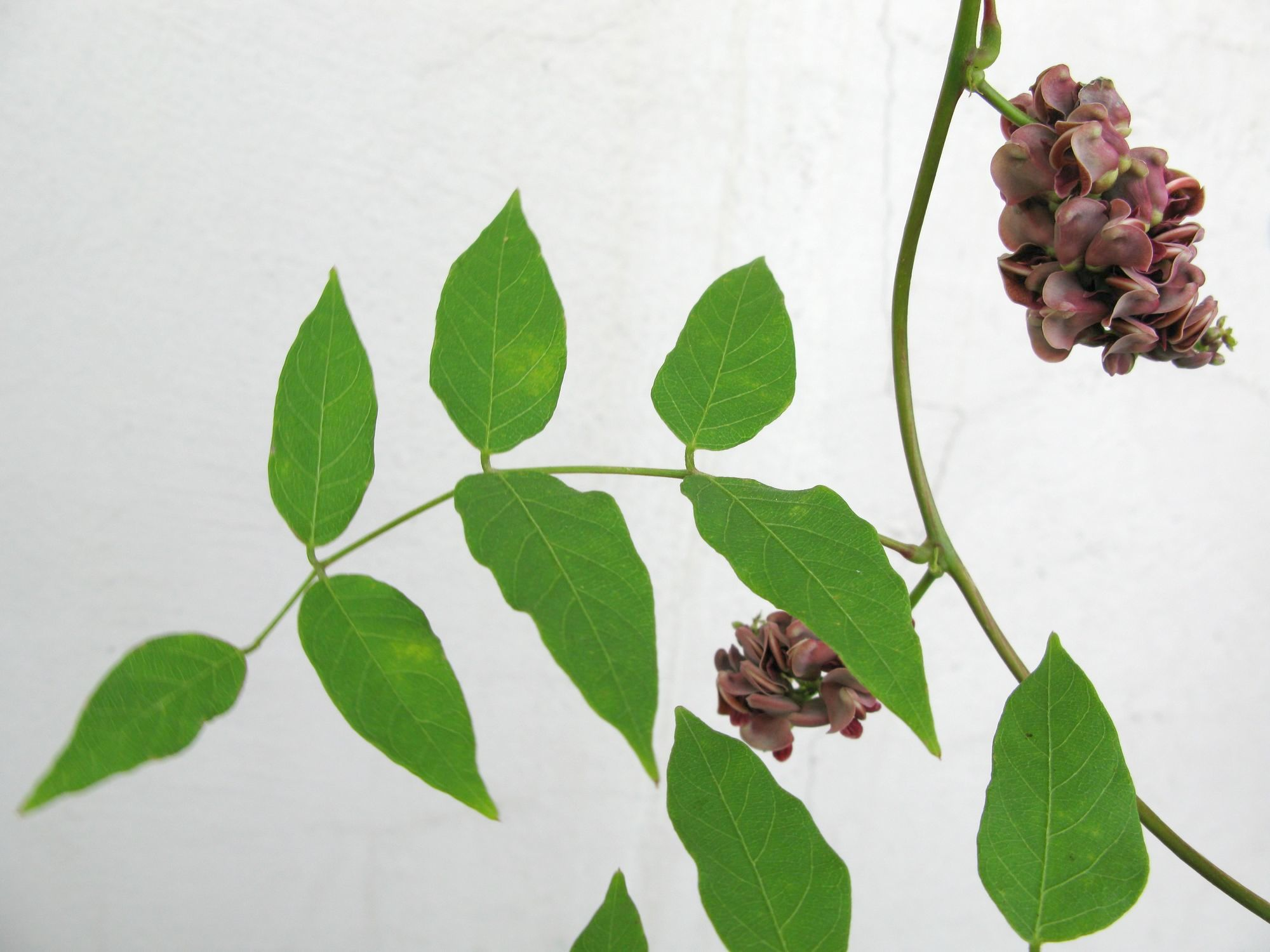 garden specimen, Hamburg, Germany. be 110 % sure not to harvest the rare species Apios priceana" !